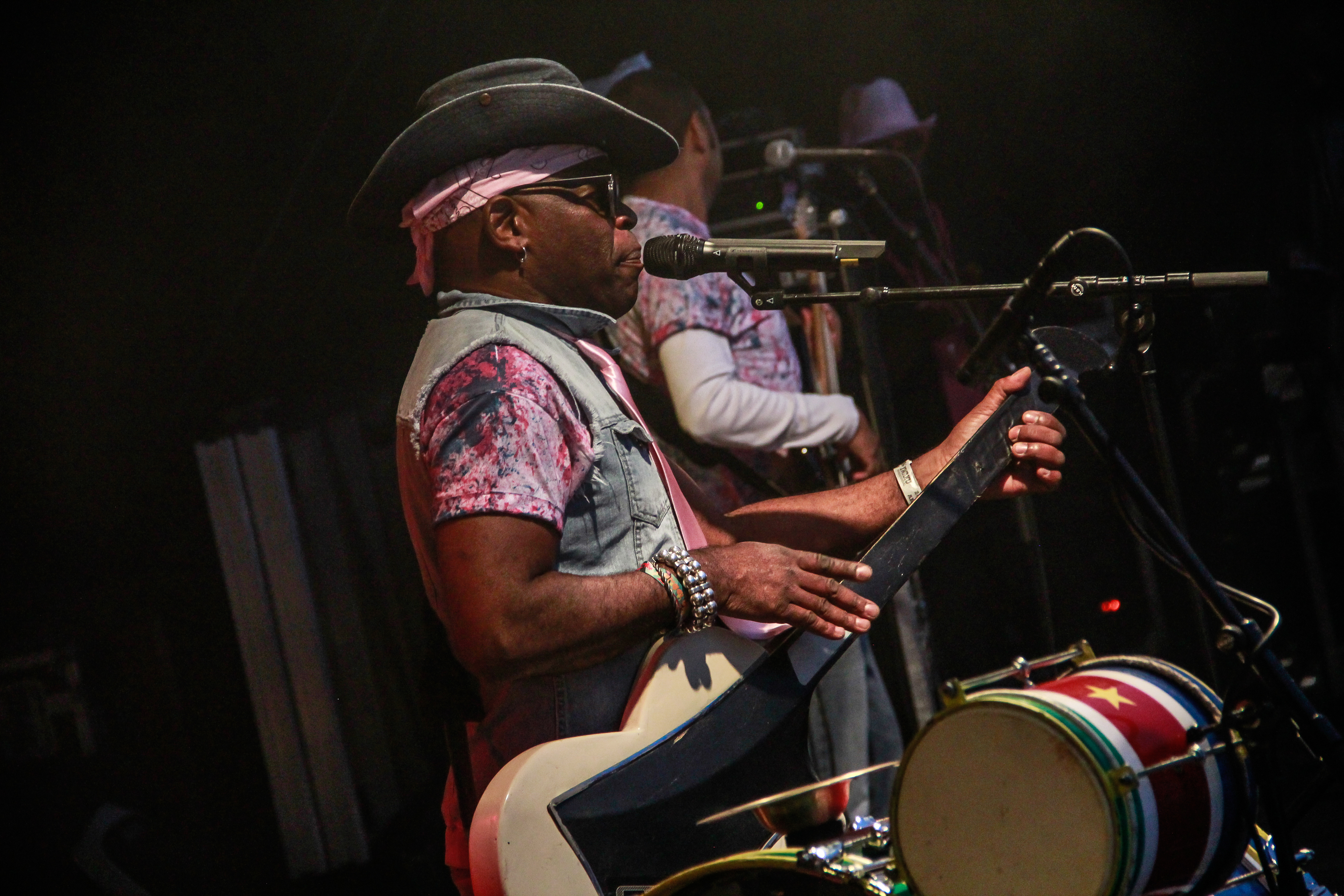 Trafassi tijdens Kwaku Summer Festival 2015